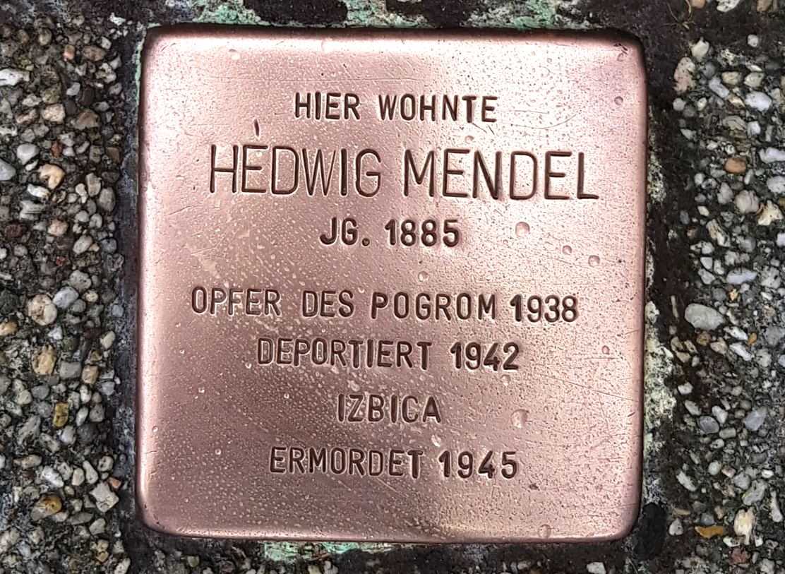 Ort: Bechemstr. 4, 47058 Duisburg-Duissern